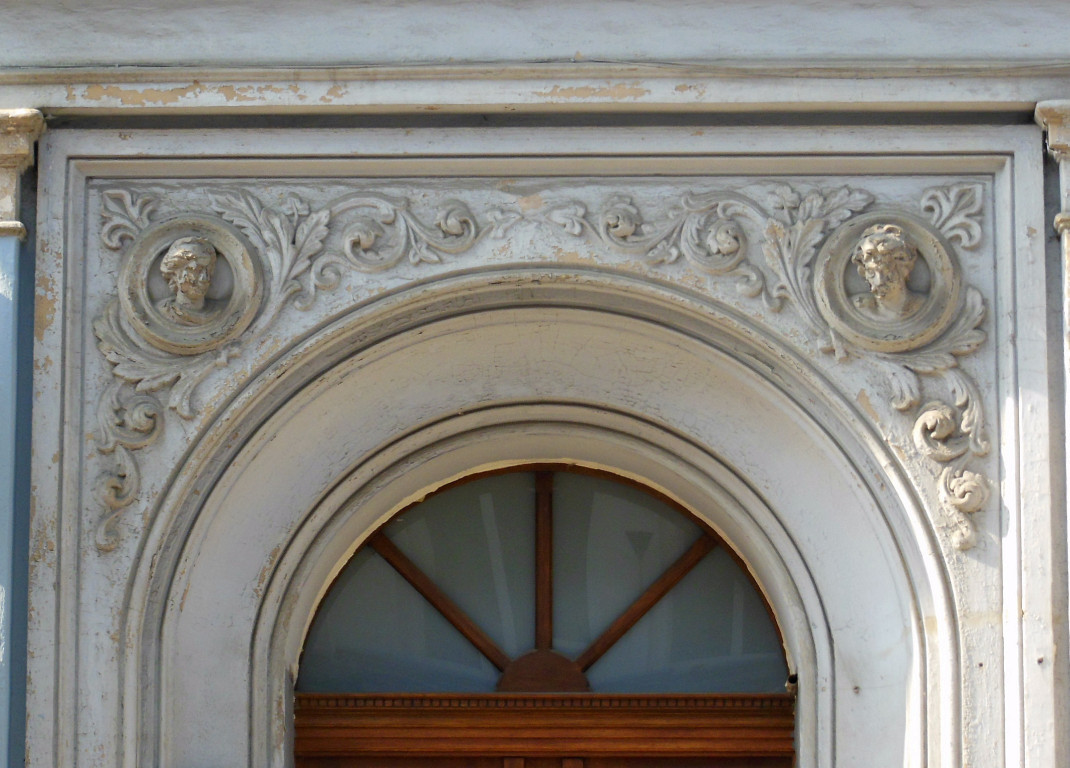 Kamienica przy ul. Dworcowe 5 w Bydgoszczy